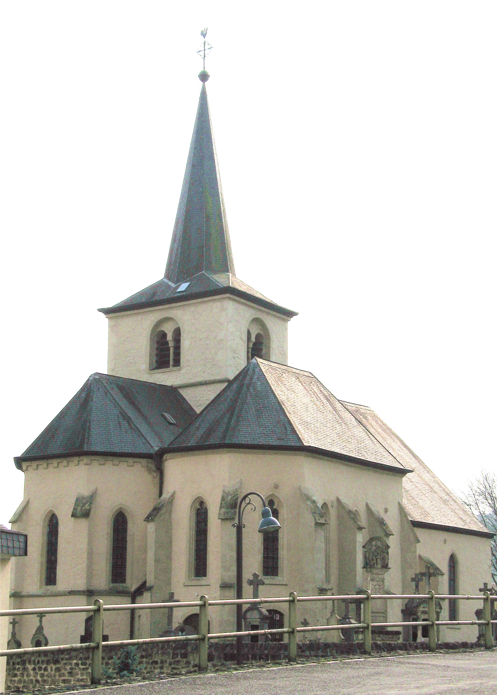 L'église de Septfontaines (Luxembourg)